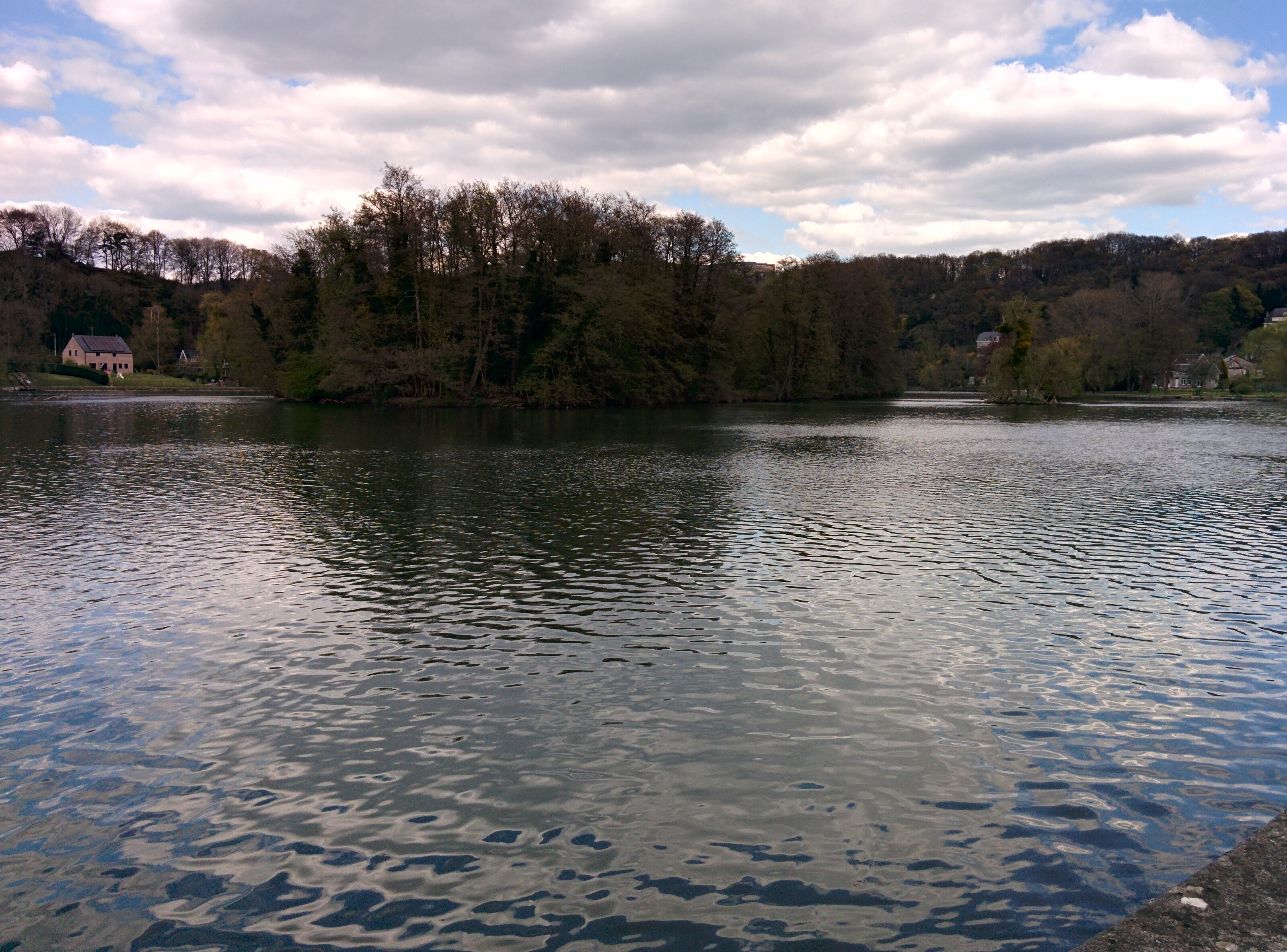 Petite Île et îlot des Îles de Godinne, en amont. Photo prise à partir de la rive droite de la Meuse.